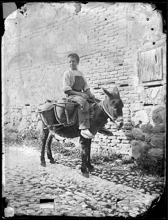 'Azacán (aguador) de Toledo' (hacia 1880) fotografiado por Casiano Alguacil.